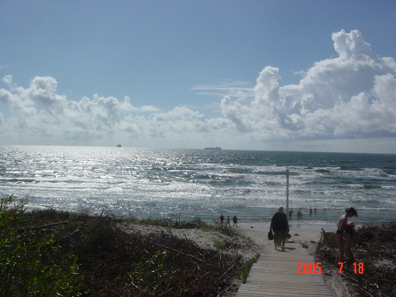 Baltijos jūra